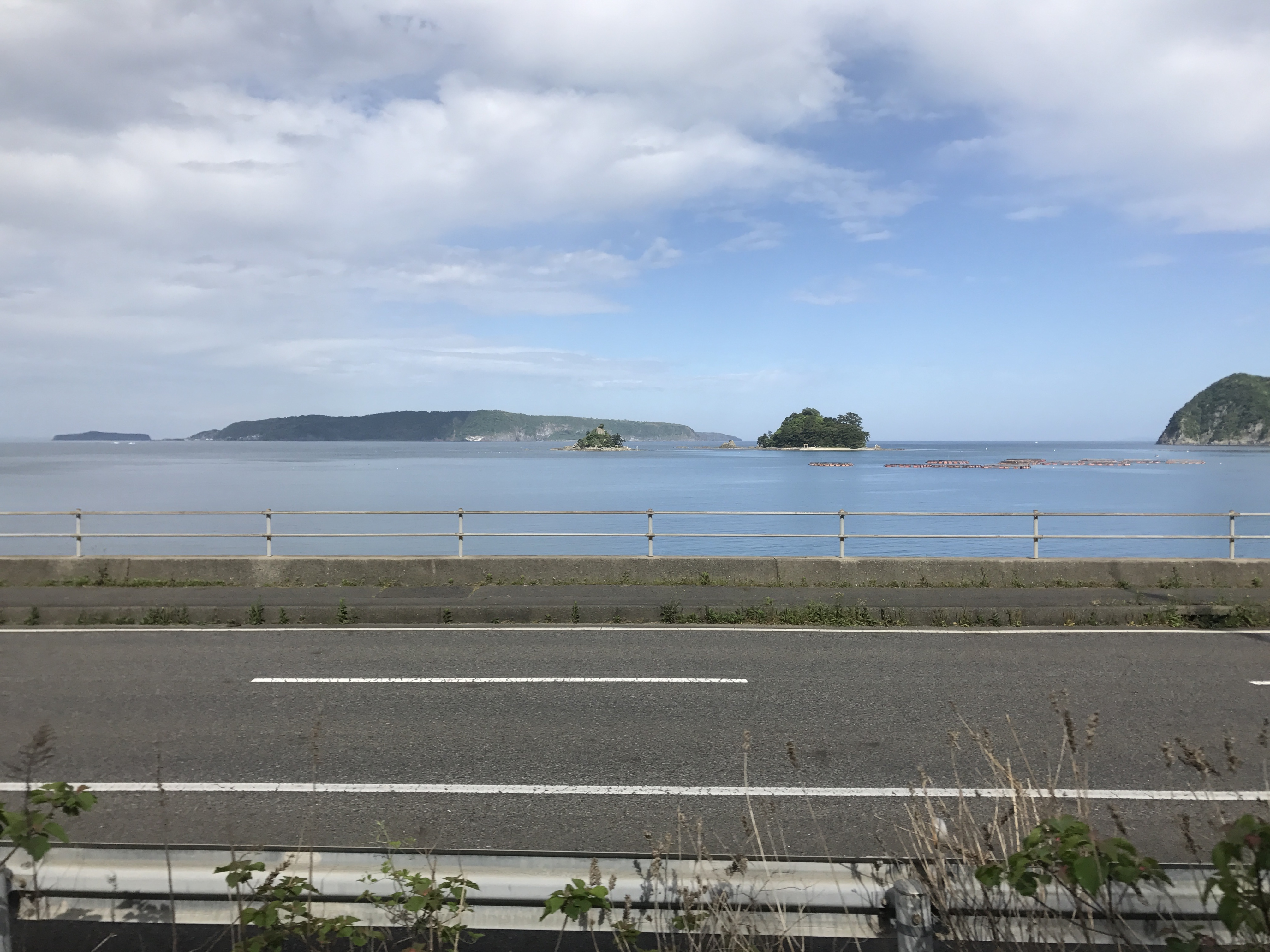 奈古漁港西側の山陰本線列車内より望む日本海。沖合の島は夫婦島(左側は女鹿島、右側は男鹿島)。左奥は肥島と大島、右側は土崎